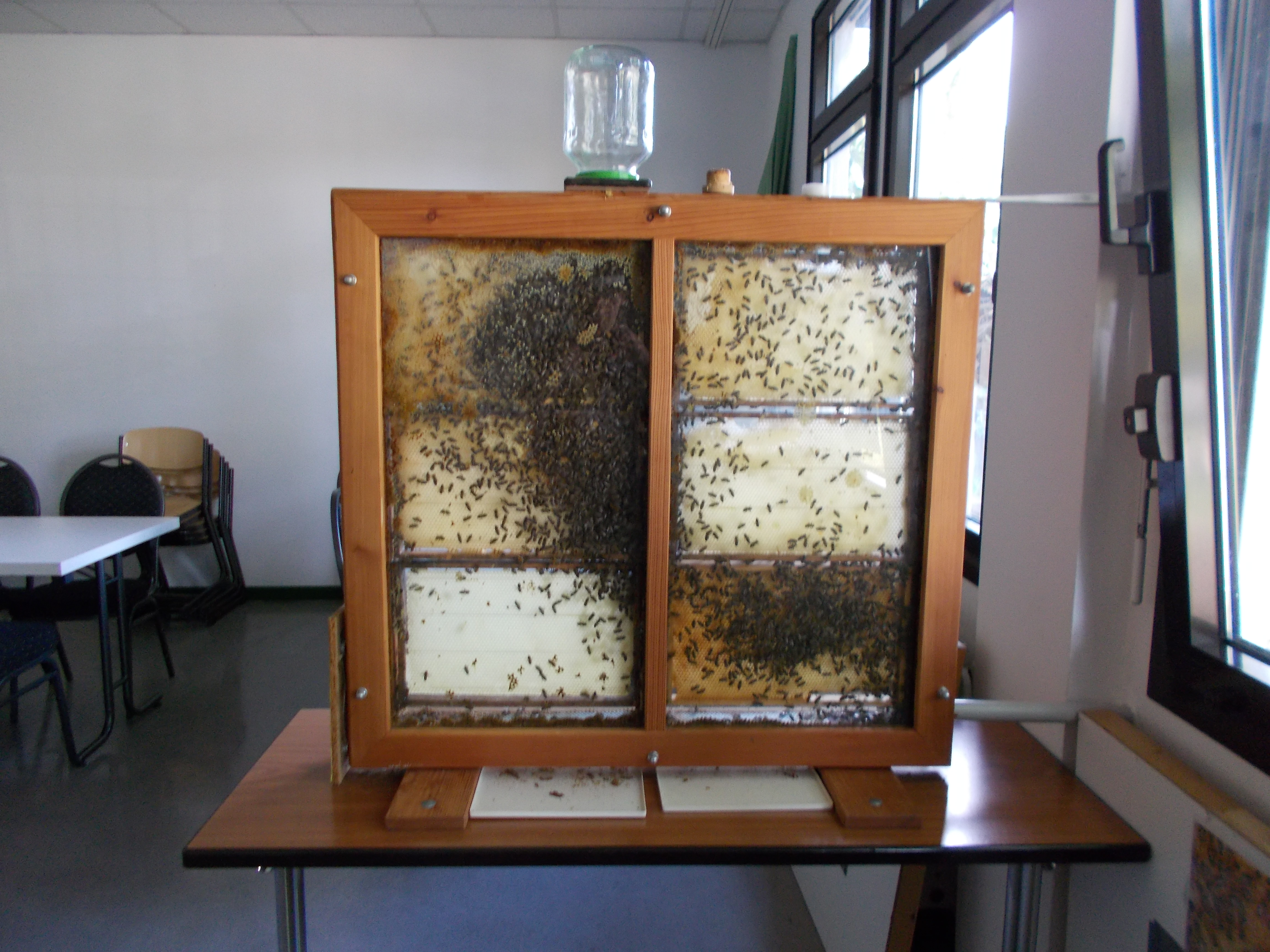 Das Bienenmuseum in Duisburg Rummeln-Kaldenhausen ist ein kleines Imkereimuseum des Kreisimkerverband Duisburg e. V. - Der gläserne Bienenkasten macht es möglich den Bienen bei der Arbeit und der Königin beim Eierlegen zuzusehen.